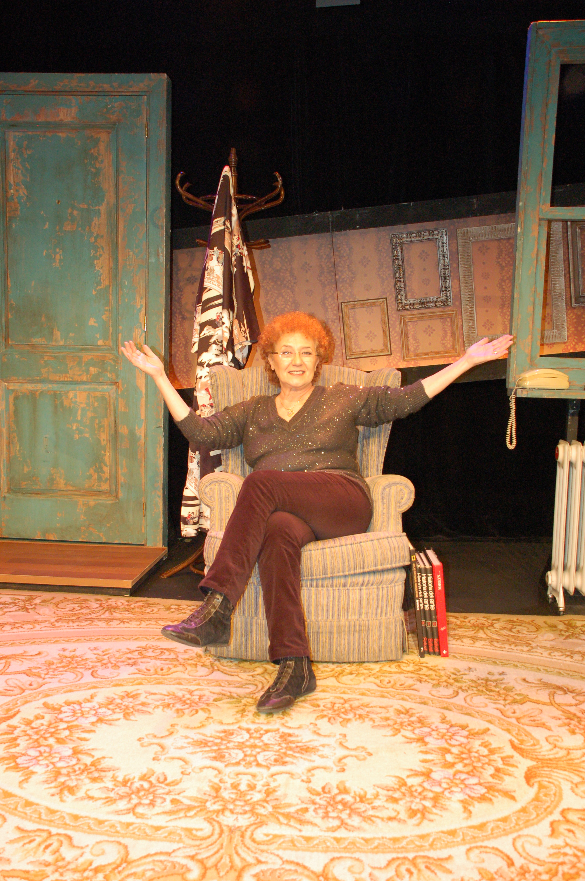 Durante una entrevista en el Teatro Fernán Gómez de Madrid